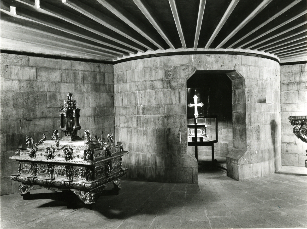 Servizio fotografico : Genova, 1963 / Paolo Monti. - Stampe: 2 : Positivo b/n, gelatina bromuro d'argento/ carta, 18x24. - ((Sul coperchio della scatola, manoscritto a pennarello: "Musei". - (1961-1963), presso Archivio Paolo Monti. - Fonte: Agenda di Paolo Monti: R 1 - Monti/ 1 aprile 1963 - 6 giugno 1964/ 6000-8193 (1964-1964), presso Archivio Paolo Monti. - Fonte: Agenda di Paolo Monti: Archivio fino 1-4-1961/ 31-3-1963